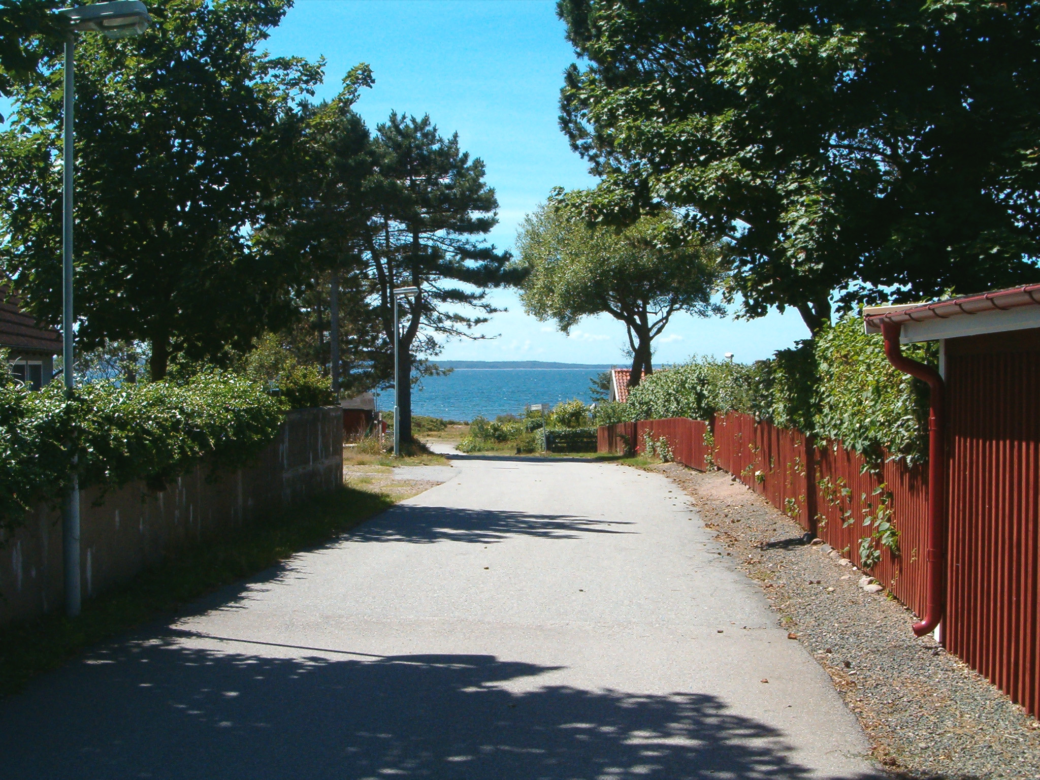 Tvärgata ner mot stranden i Domsten, Helsingborgs kommun.